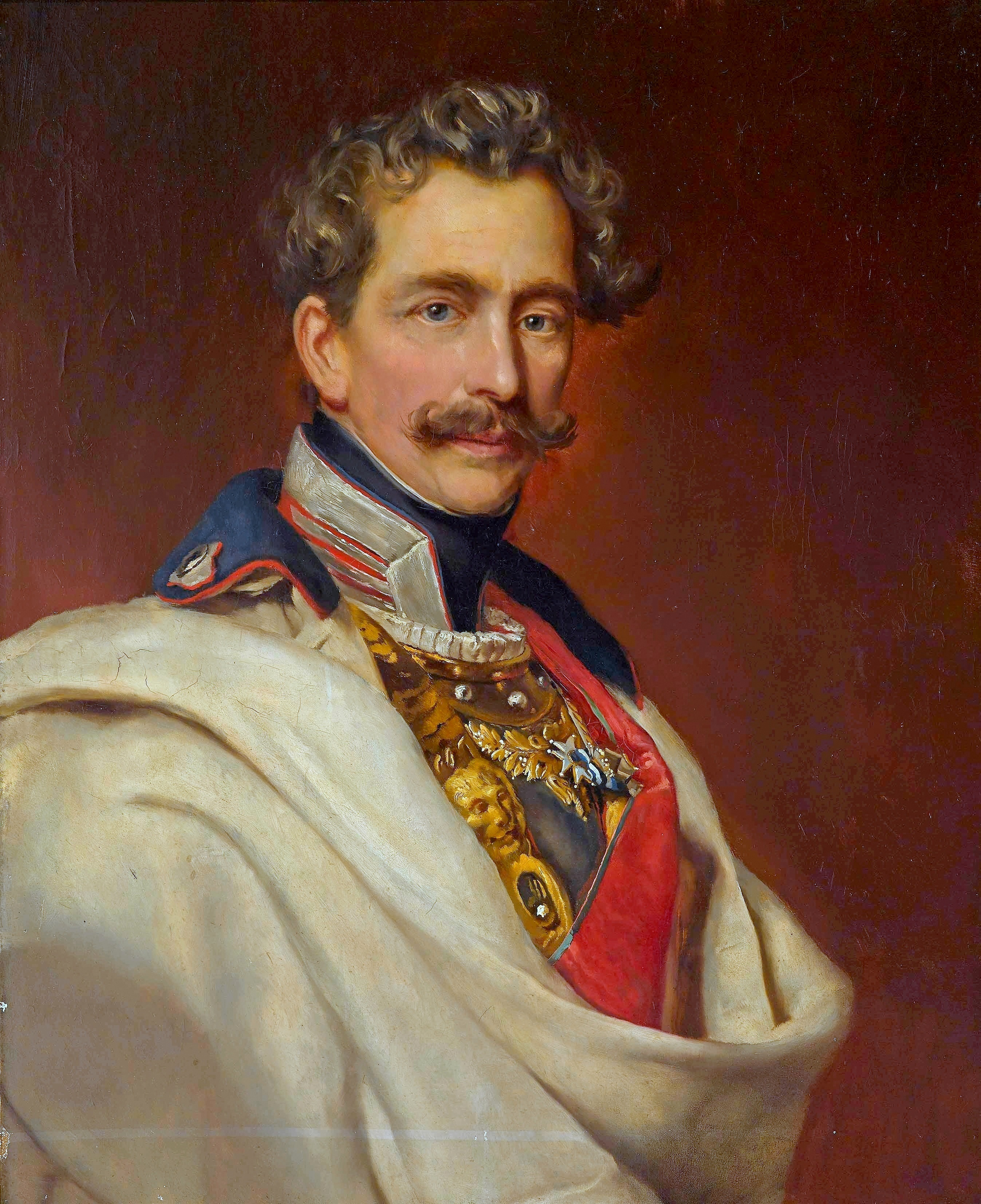 Prinz Karl von Bayern